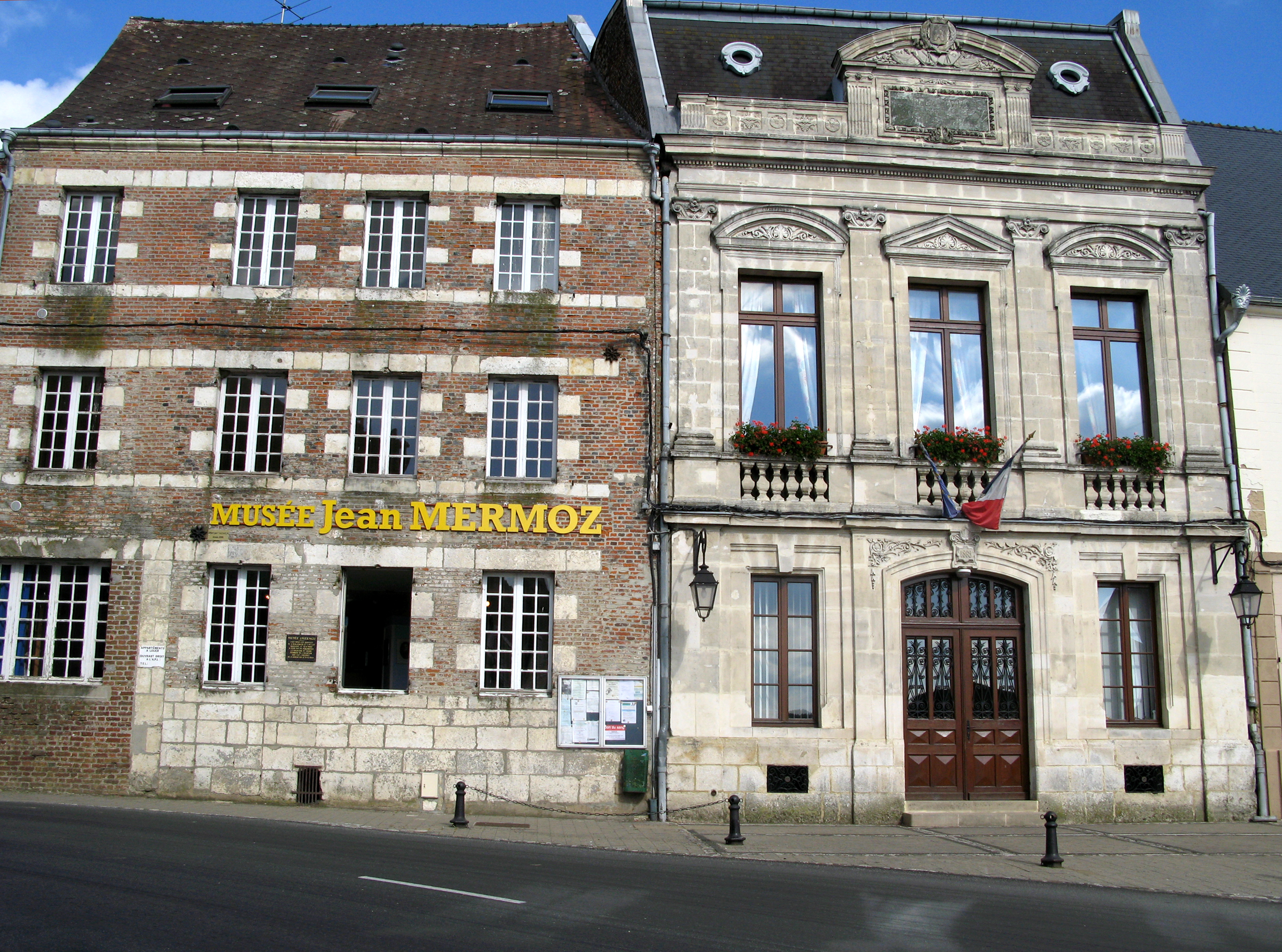 Aubenton (Aisne, France) - Le Musée Jean Mermoz est installé à l'angle de la place de l'église. .